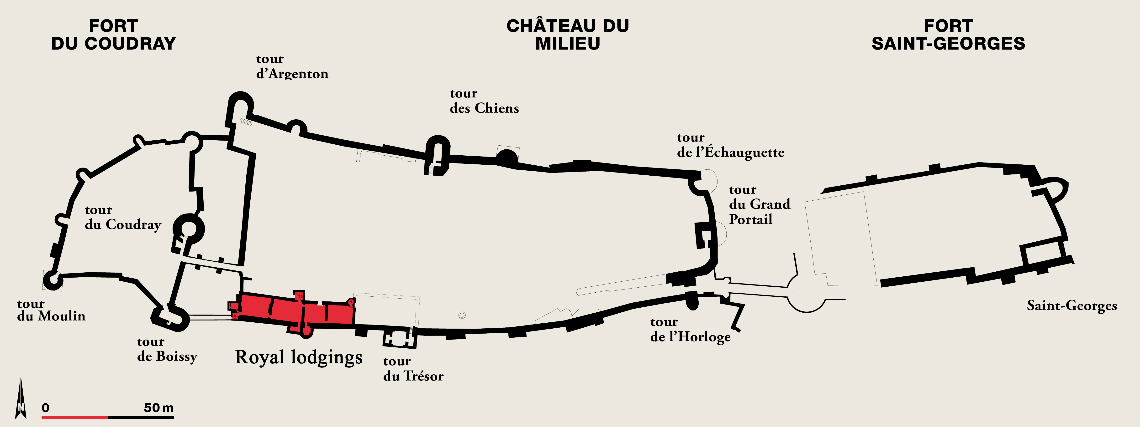 Plan de la forteresse royale de Chinon réalisé par Agnès Dahan